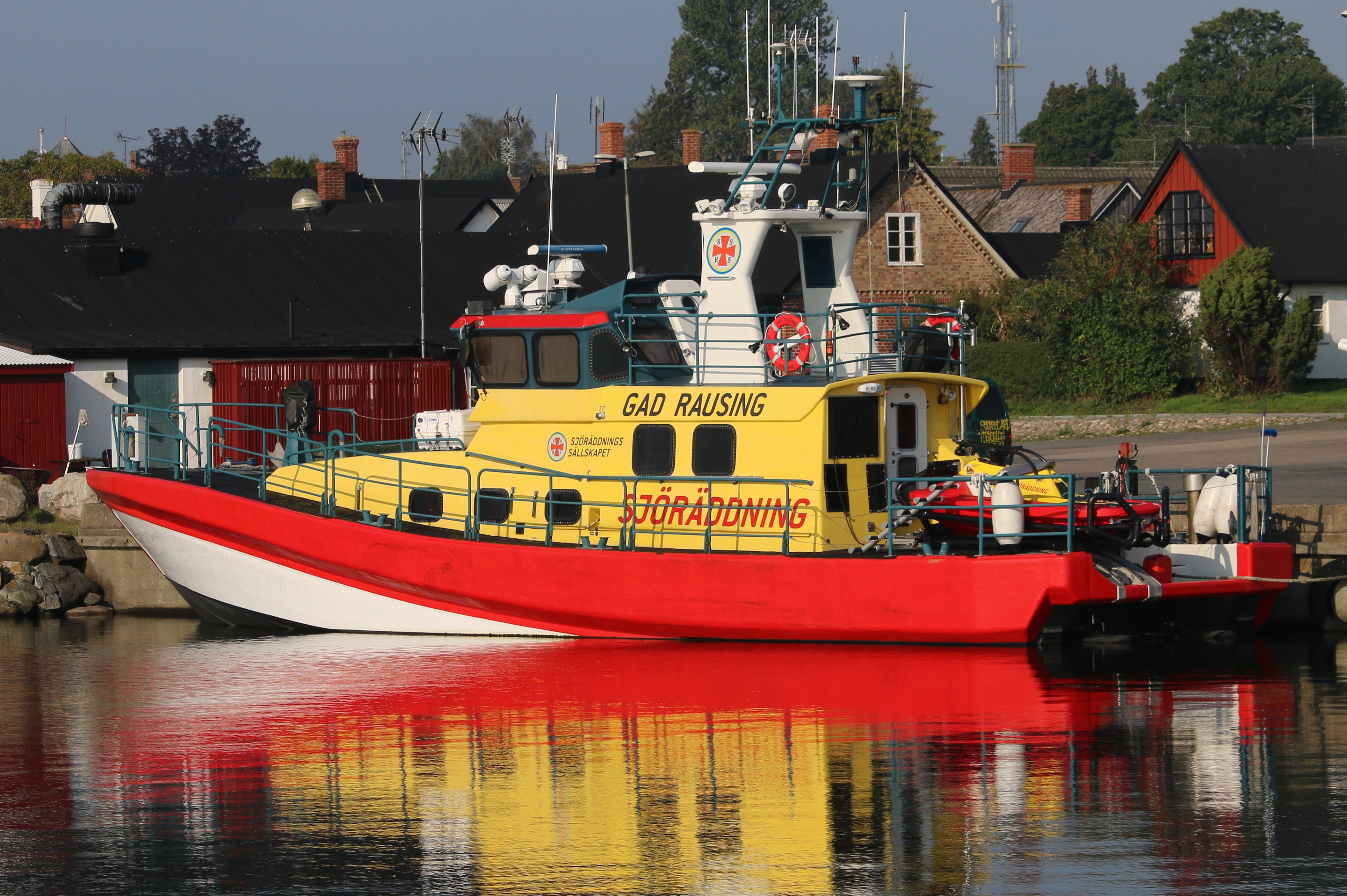 Rescue Gad Rausing i Skillinge 2017